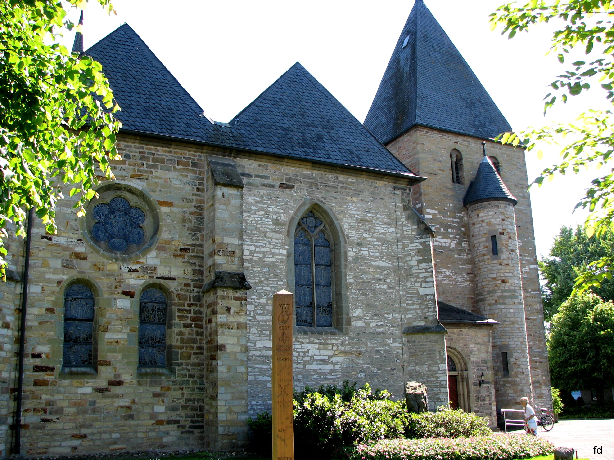 Kirche St. Dionysius Bökenförde This is a photograph of an architectural monument.